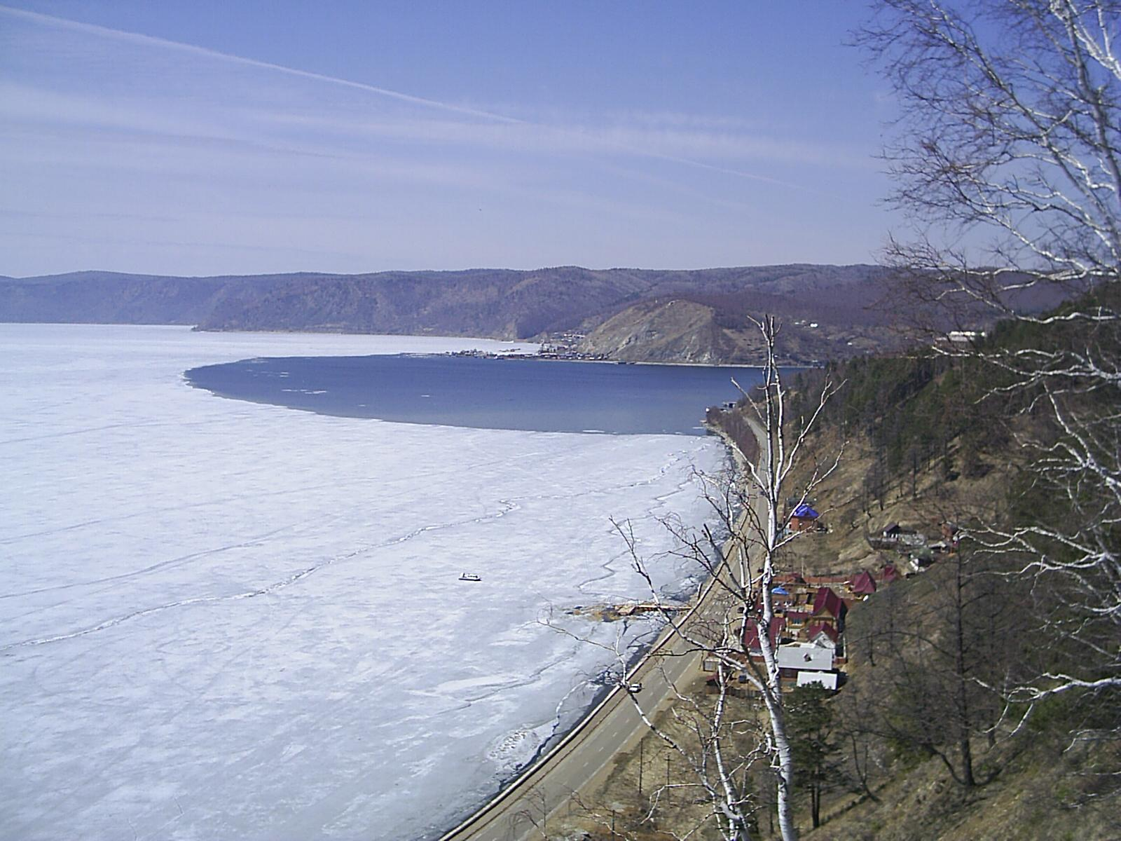 Листвянка (Иркутская обл.). Вид сверху (с сопок) издали на исток Ангары. Снимок мая 2005 г.